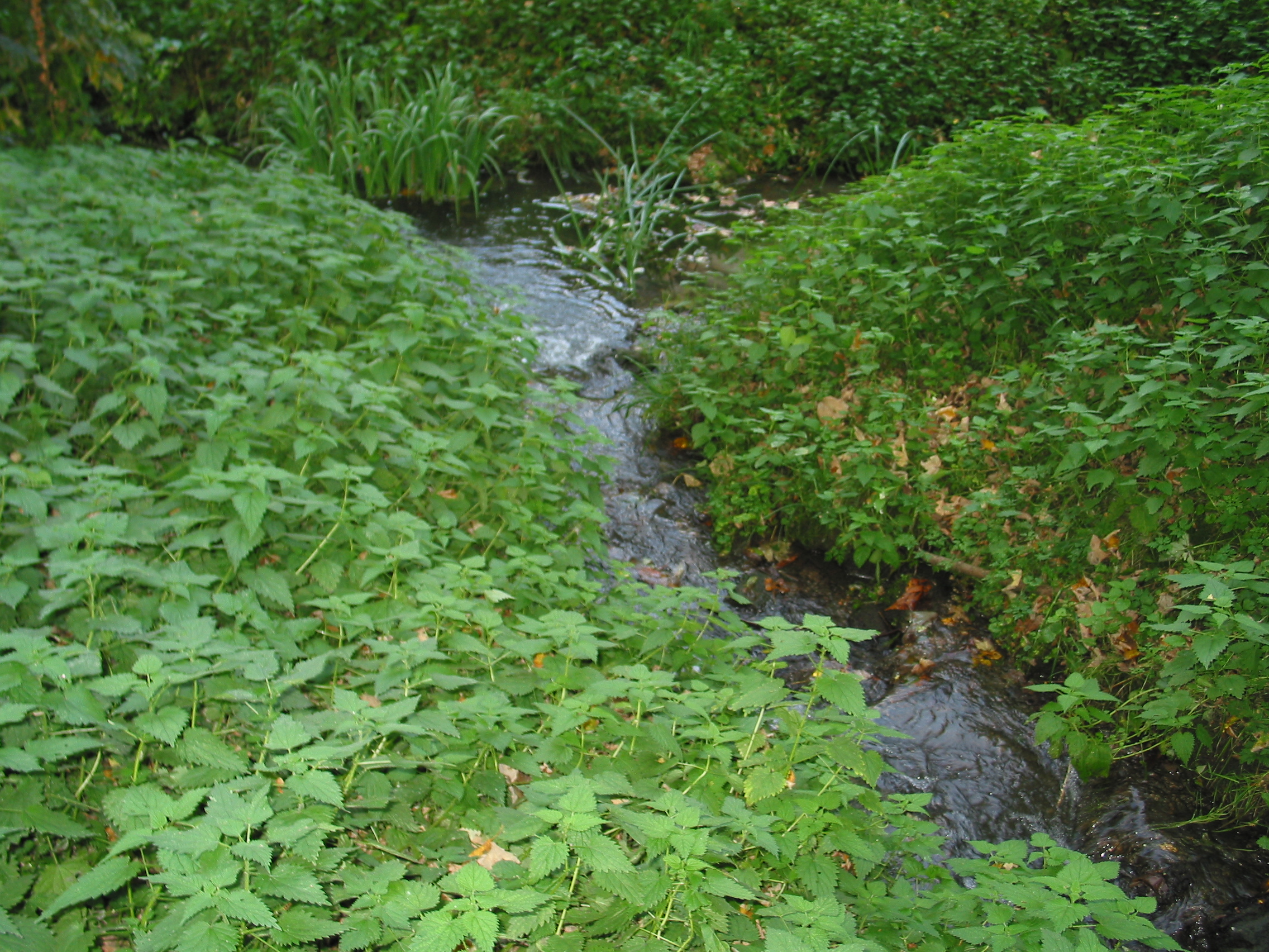 De Strijthagerbeek kabbelt rustig ter hoogte van de Strijthagermolen